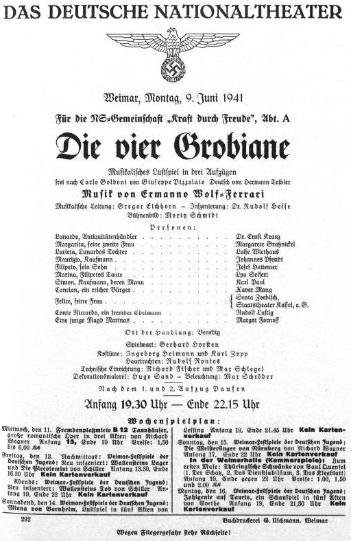 DAS DEUTSCHE NATIONALTHEATER / Weimar, Montag, 9. Juni 1941 / Die vier Grobiane / Musikalisches Lustspiel in drei Aufzügen / frei nach Carlo Goldoni von Guiseppe Pizzolato Deutsch von Hermann Teibler / Musik von Ermanno Wolf=Ferrari / Musikalische Leitung: Gregor Eichhorn - Inszenierung: Dr. Rudolf Hesse